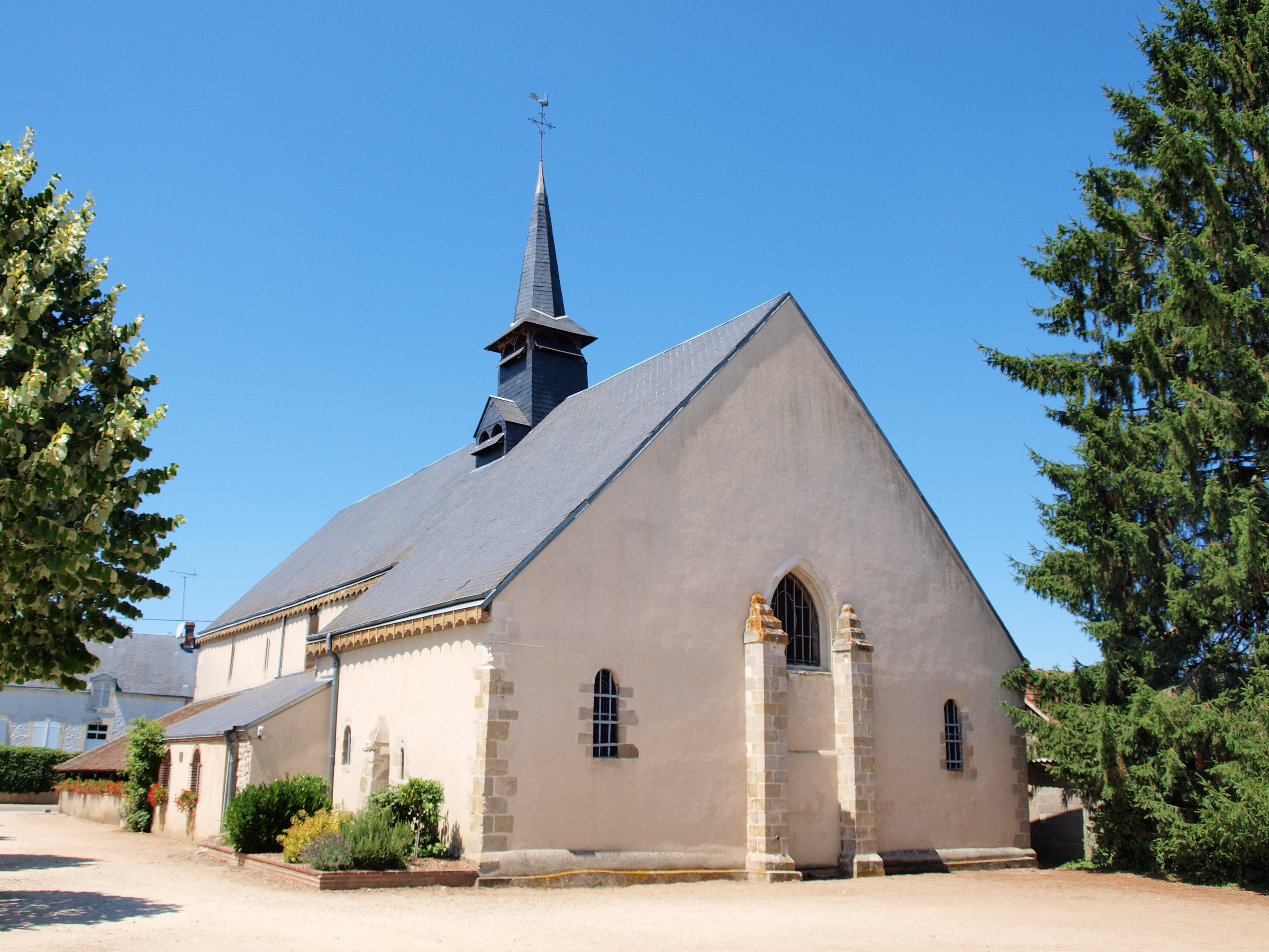 Église Saint-Martin de Guilly (Loiret, France)